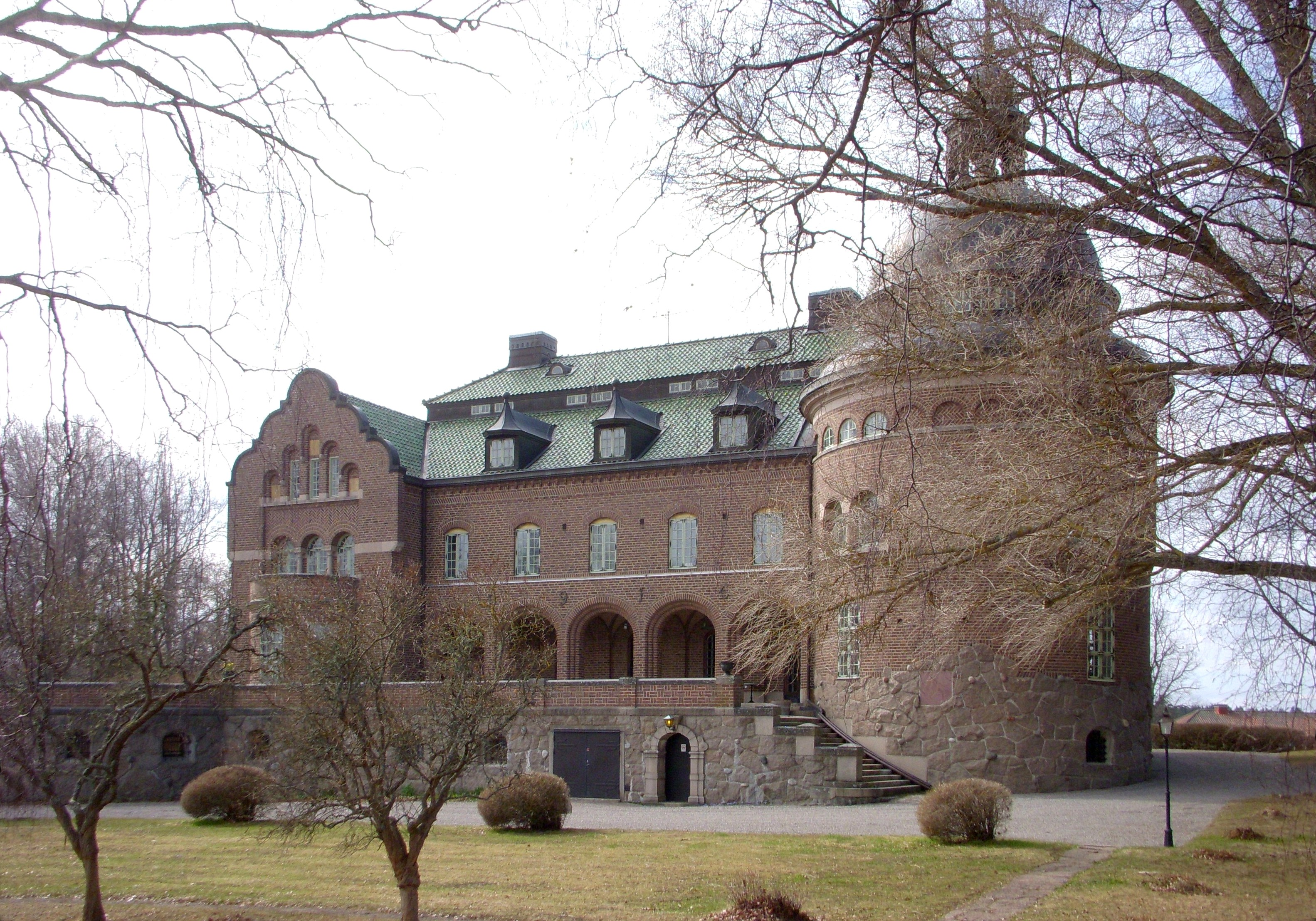 Ängsholm, även Engsholms slott i Ytterjärna socken, Södertälje kommun, Stockholms län